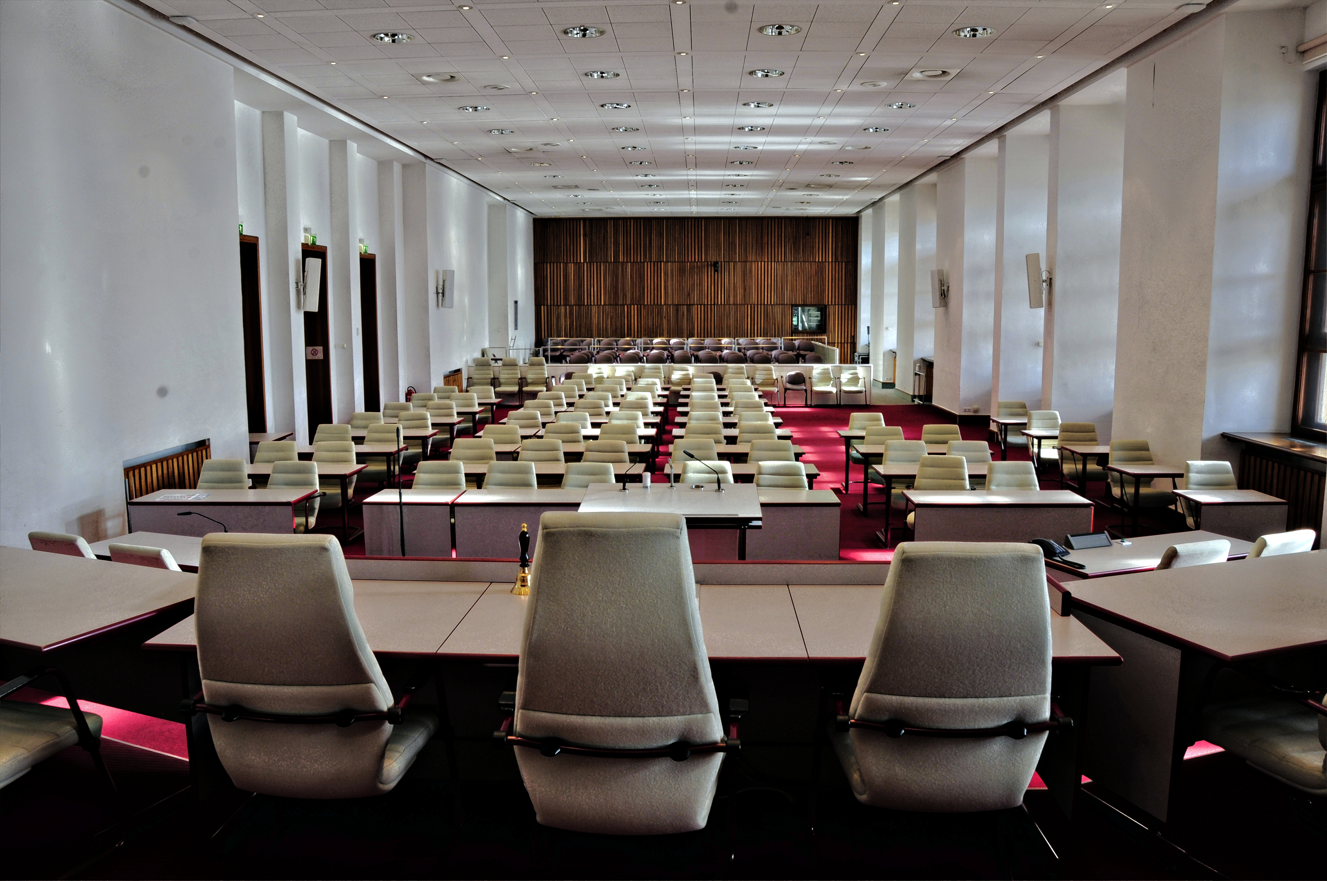 Landtagsprojekt Mecklenburg-Vorpommern 2013